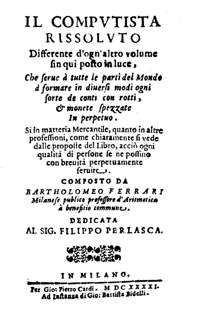 Il computista rissoluto differente d'ogn'altro volume sin qui posto in luce, che serue a tutte le parti del mondo a formare in diuersi modi ogni sorte de conti con rotti, & monete spezzate in perpetuo. ... Composto da Bartholomeo Ferrari Milanese pubblico professore di aritmetica .... - In Milano : per Gio. Pietro Cardi : ad instanza di Gio. Battista Bidelli, 1641. - [24], 1000 [i.e. 308], [4] p. ; 12° .